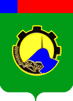 Герб Арсеньева (1967 год) Приморский край